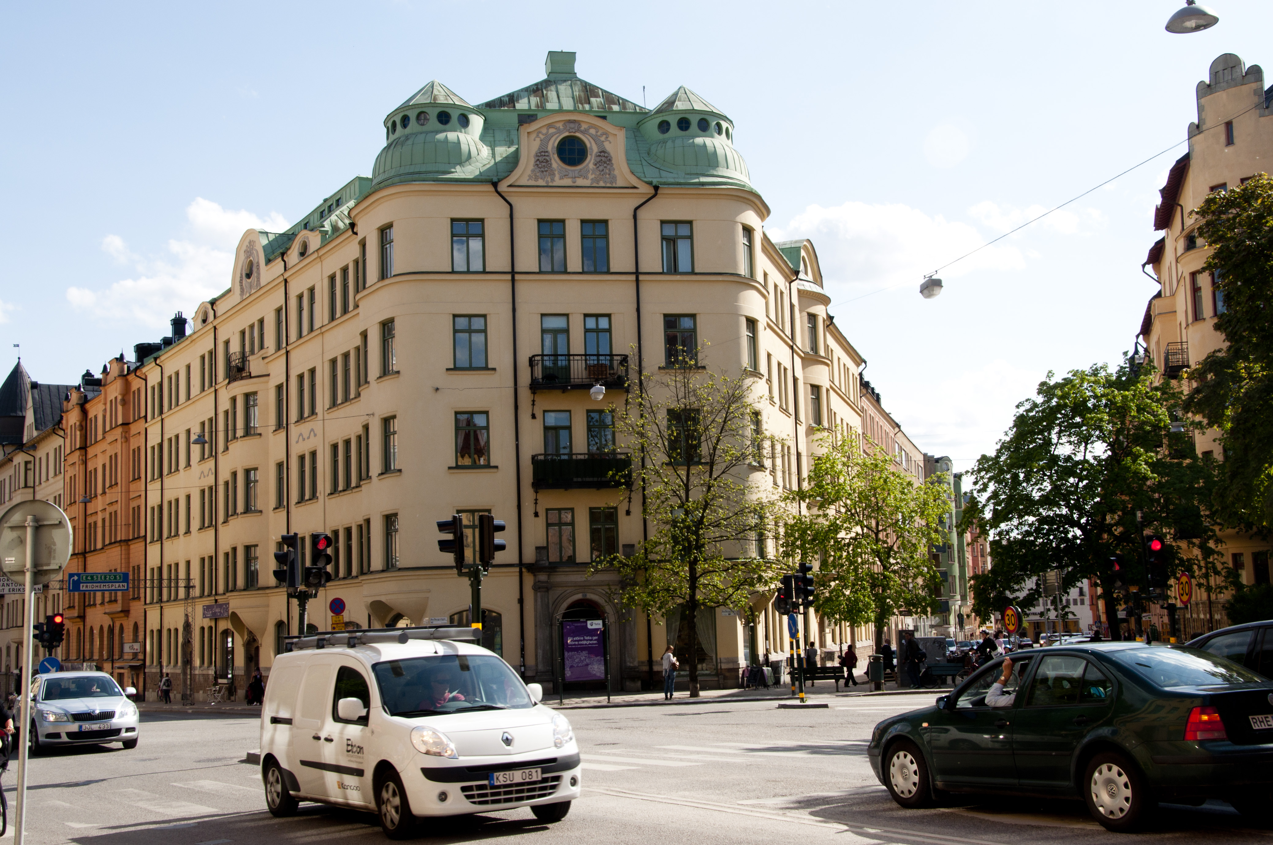 Formen 1, Birkagatan 34-36, Karlbergsvägen 45, Torsgatan 51-53, Byggnadsår 1902-04, arkitekt Gustaf Detthoff, byggherre Rörstrand AB, byggmästare O A Carlsson.